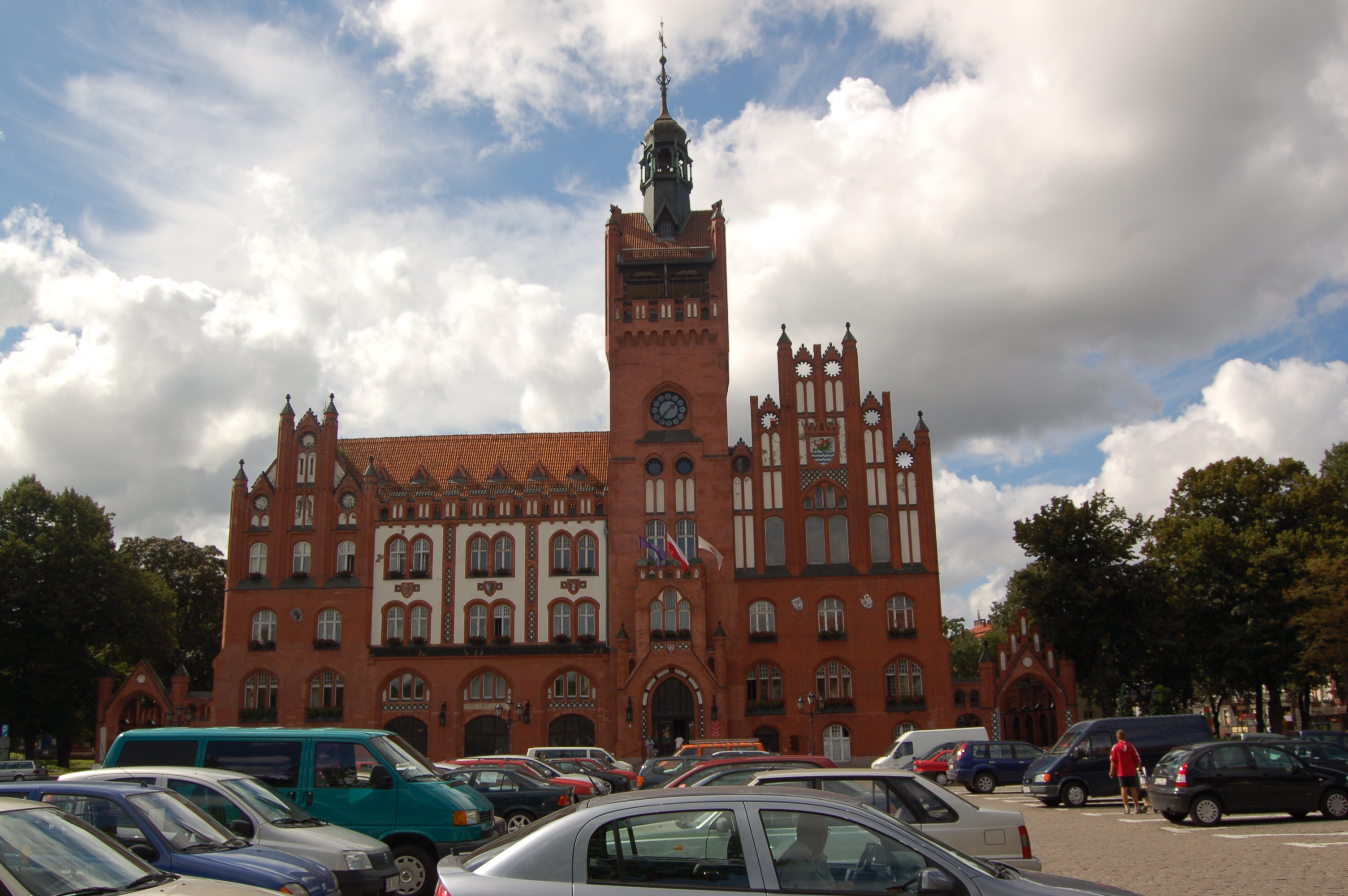 Ratusz w Słupsku